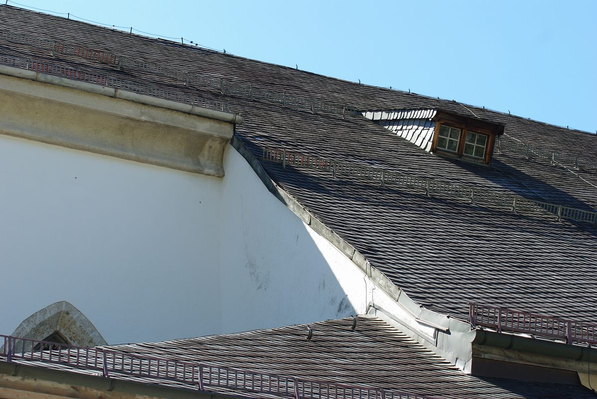 Übergang romanisches Mittelschiff zum Gesamtdach aus dem frühen 20. Jahrhundert an der Kirche St. Zeno in 83435 Bad Reichenhall